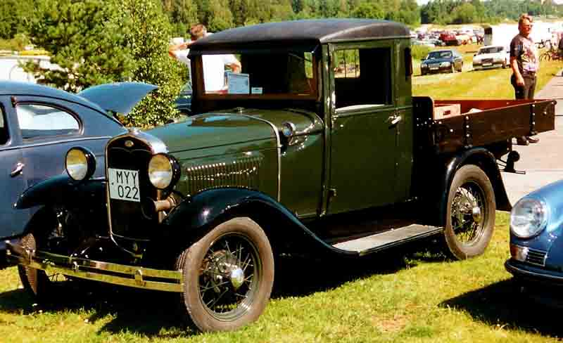 Ford Model A Pickup 1931